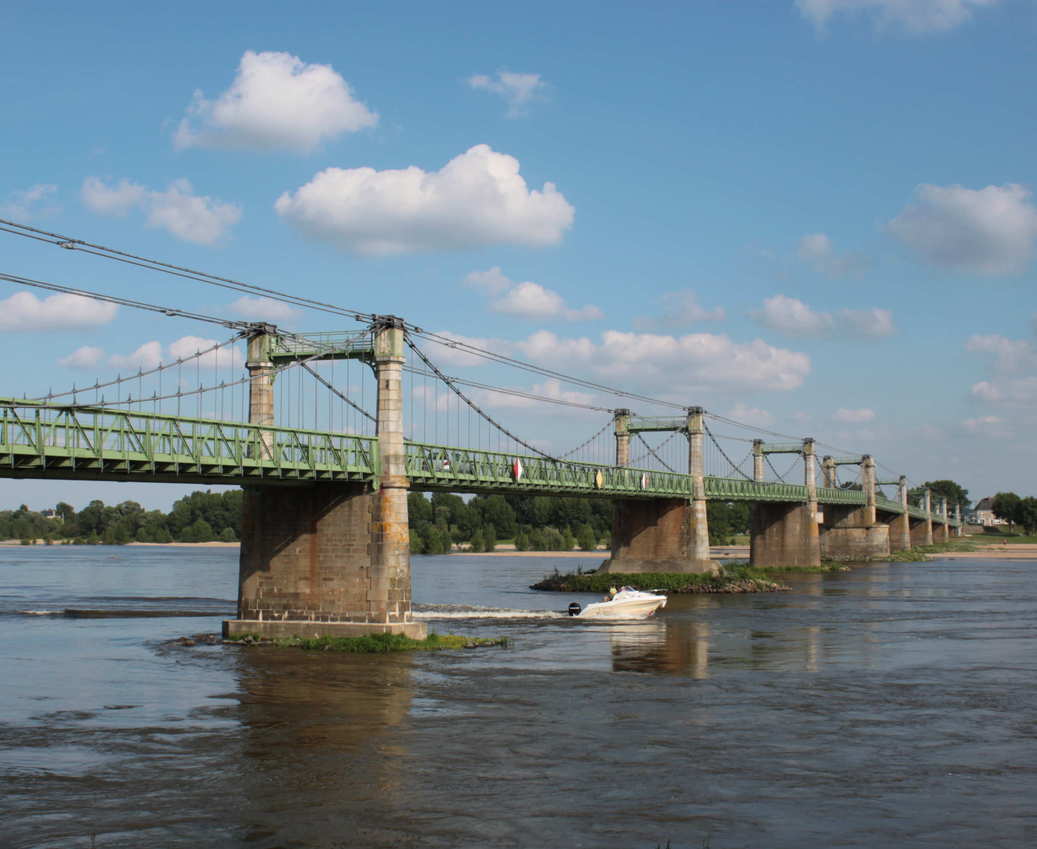 Pont d'Ingrandes, Fr-49-Ingrandes-sur-Loire.